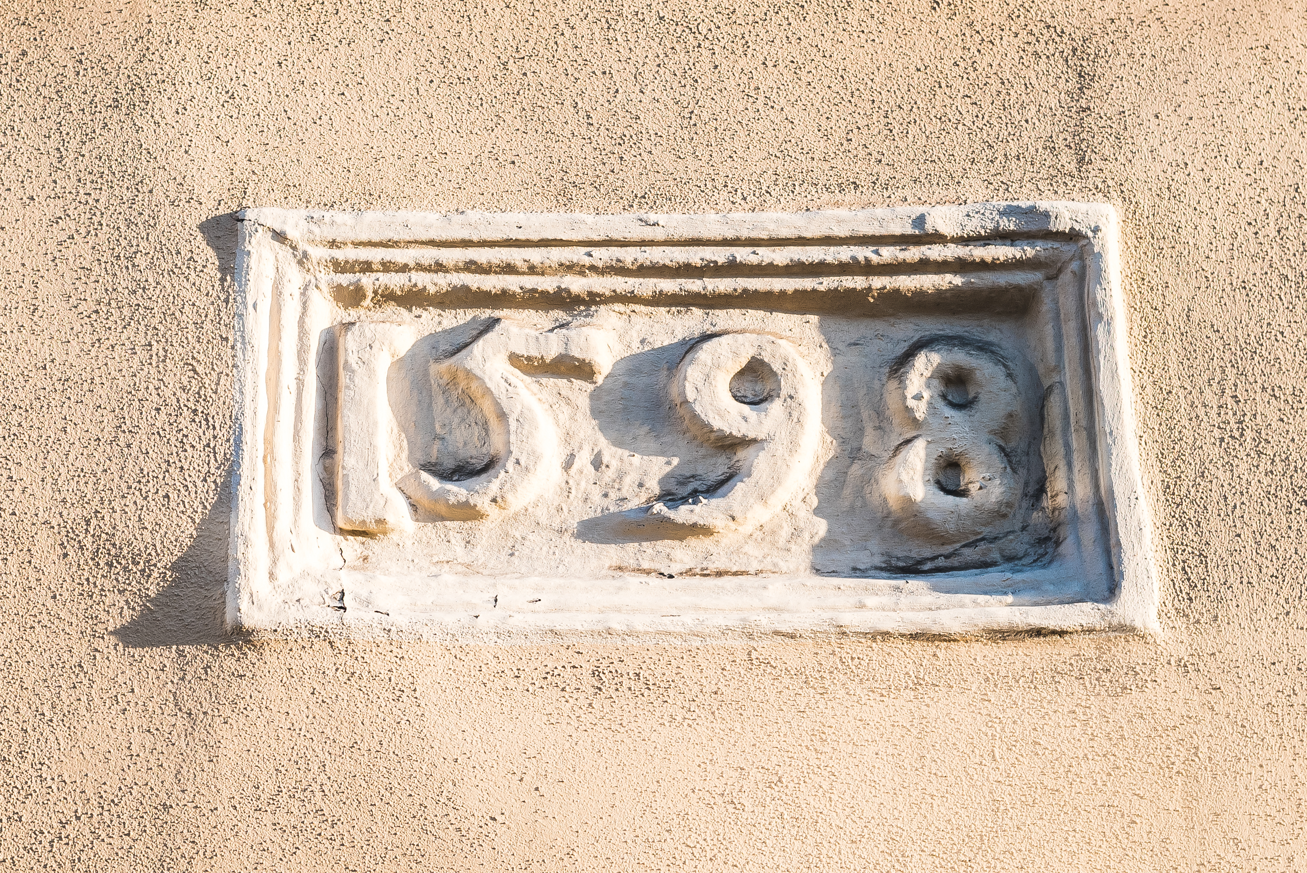 Siedziba Stowarzyszenia Miłośników Ziemi Tarnogórskiej - medallion z data budowy